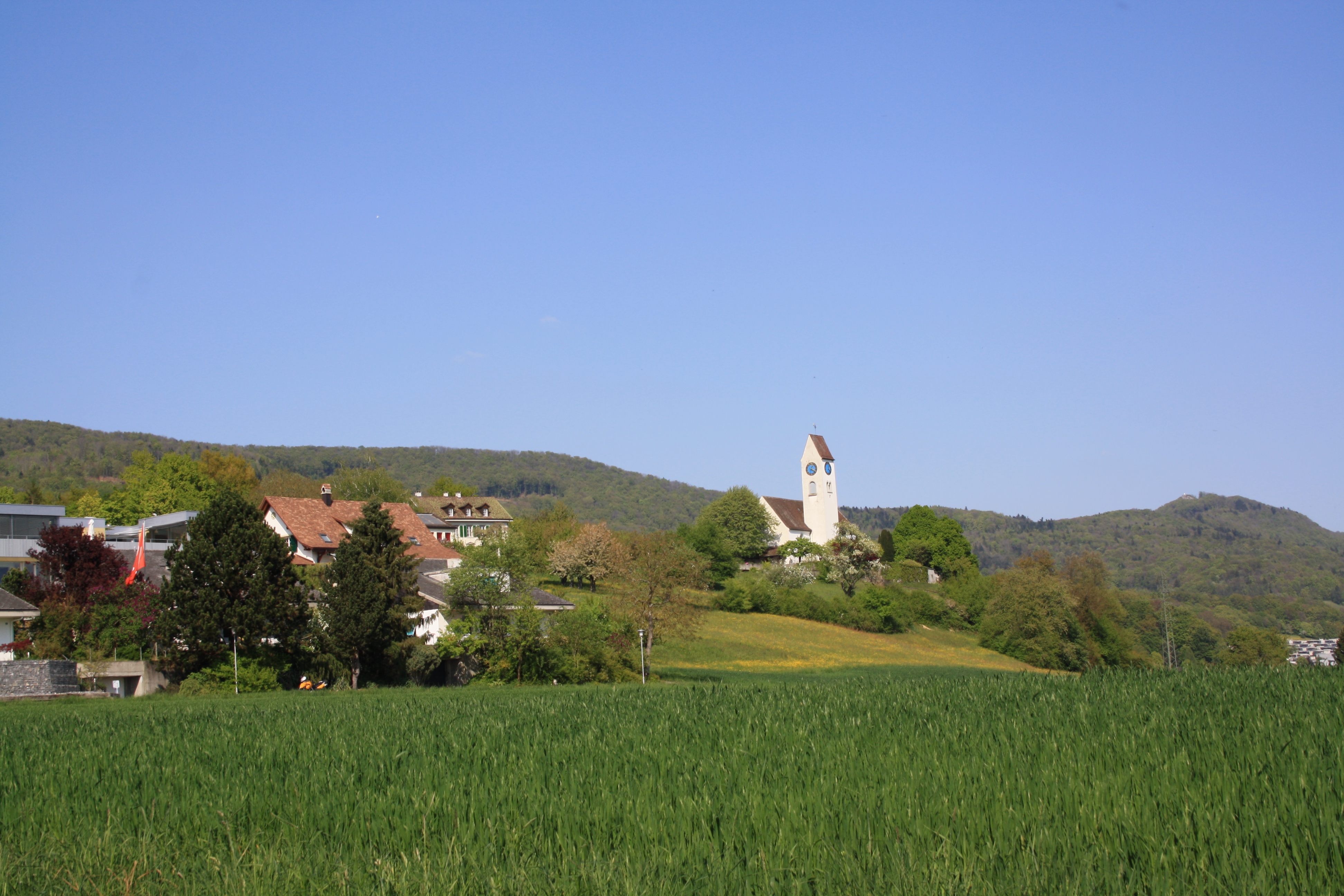 Kirche